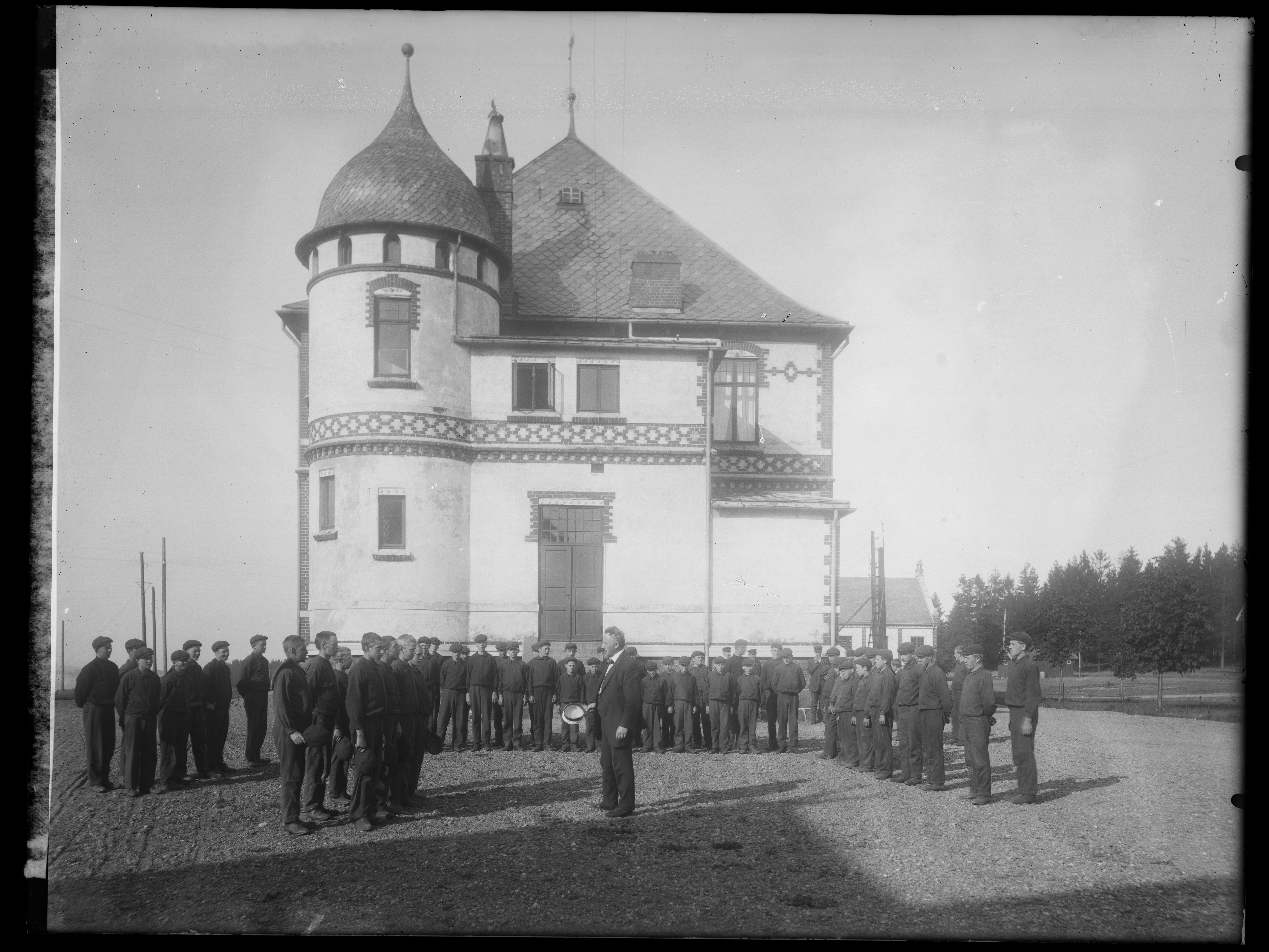 Bildet er hentet fra Nasjonalbibliotekets bildesamling. Anmerkninger til bildet var: Påskrift arkivark: Bastø skolehjem Eldste arkivnummer: 965 Yngre arkivnummer: 168 Bastøya, Horten, Vestfold